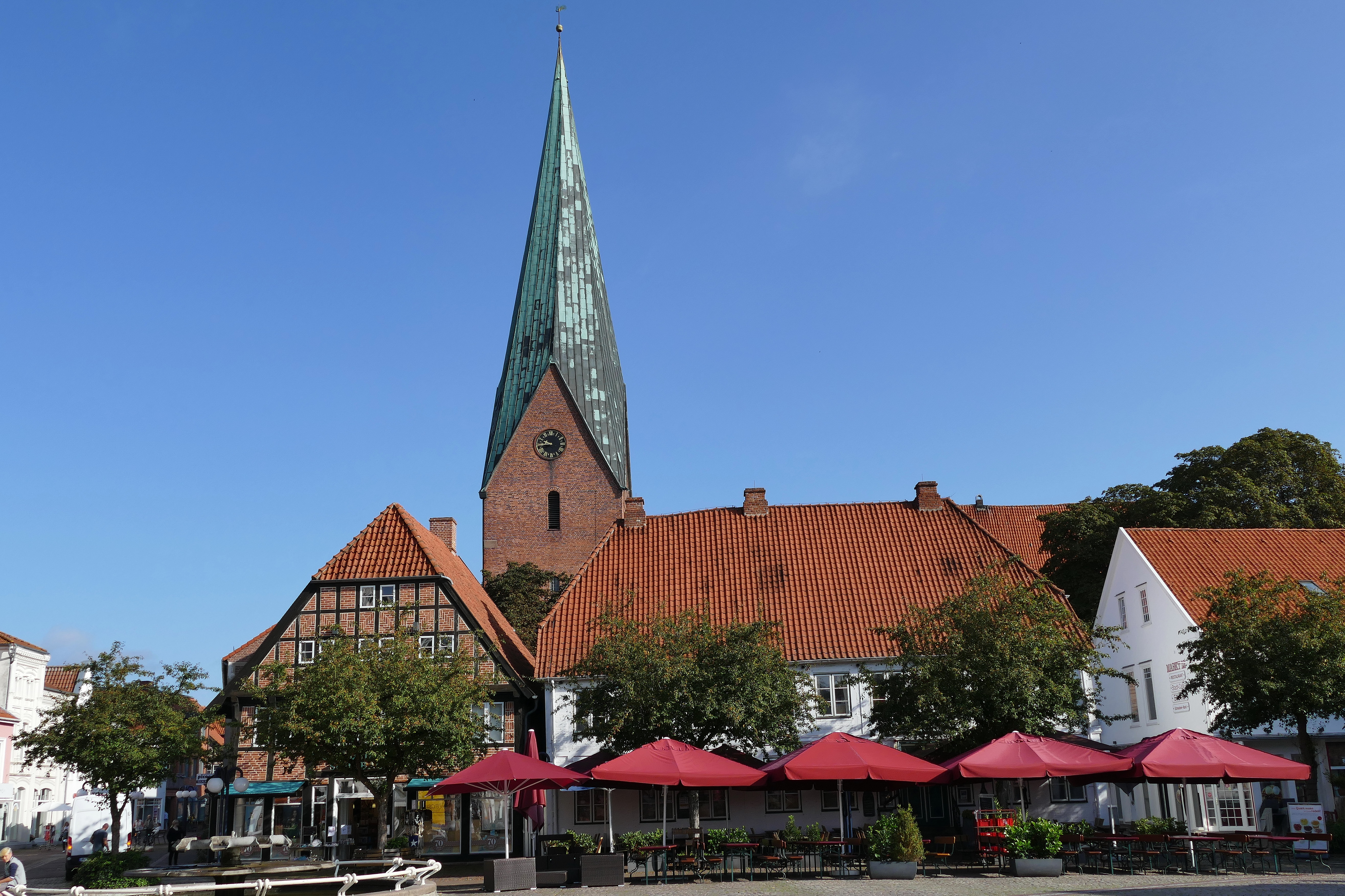 Auf dem 4400 Quadratmeter großen Marktplatz der Stadt Eutin findet zweimal wöchentlich ein Lebensmittel- und Blumenmarkt statt. Gleich dahinter befindet sich die St. Michaelis Kirche.